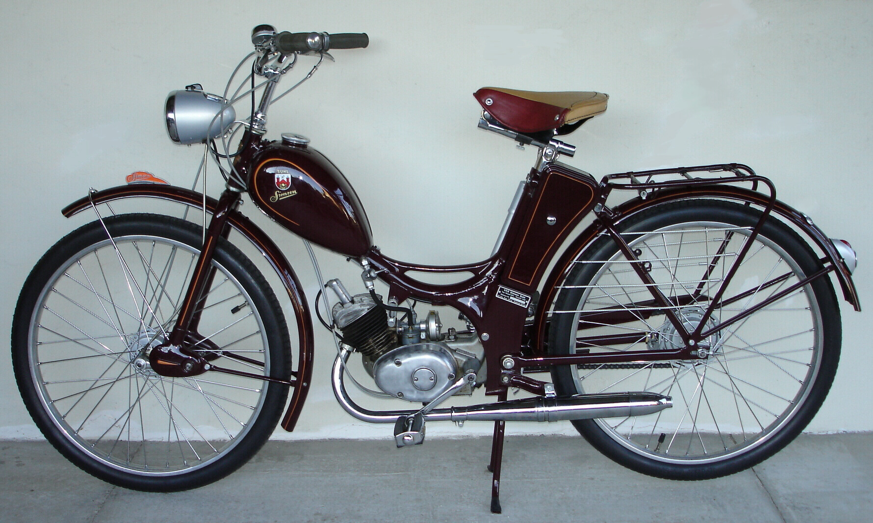 DDR-Moped Simson SR1, Baujahr 1955, erste Ausführung